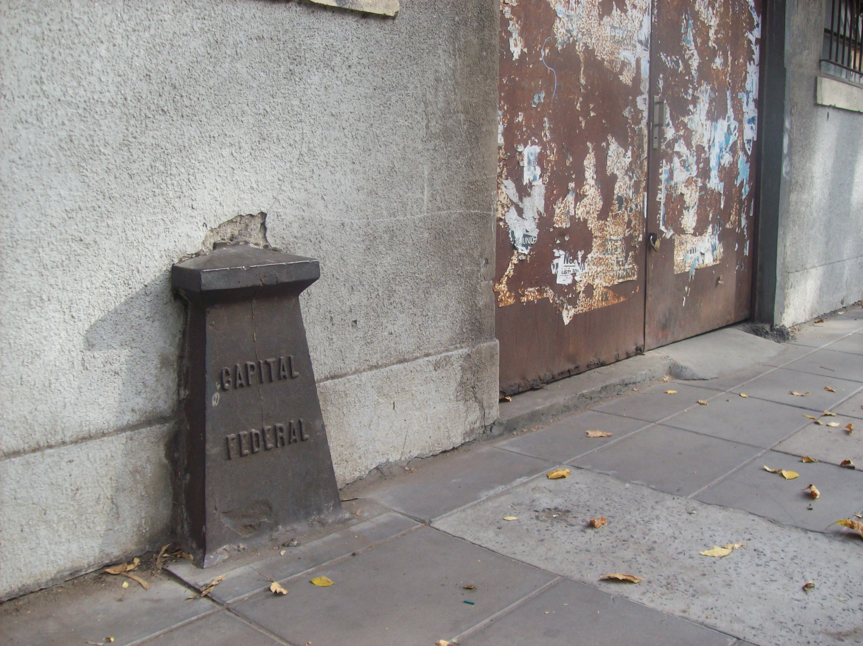 Mojón número 9 que indica el límite entre la Capital Federal (Ciudad de Buenos Aires) y la provincia de Buenos Aires. El límite es la línea de edificación. Ubicado en Villa Lynch, partido de San Martín, provincia de Buenos Aires, Argentina.